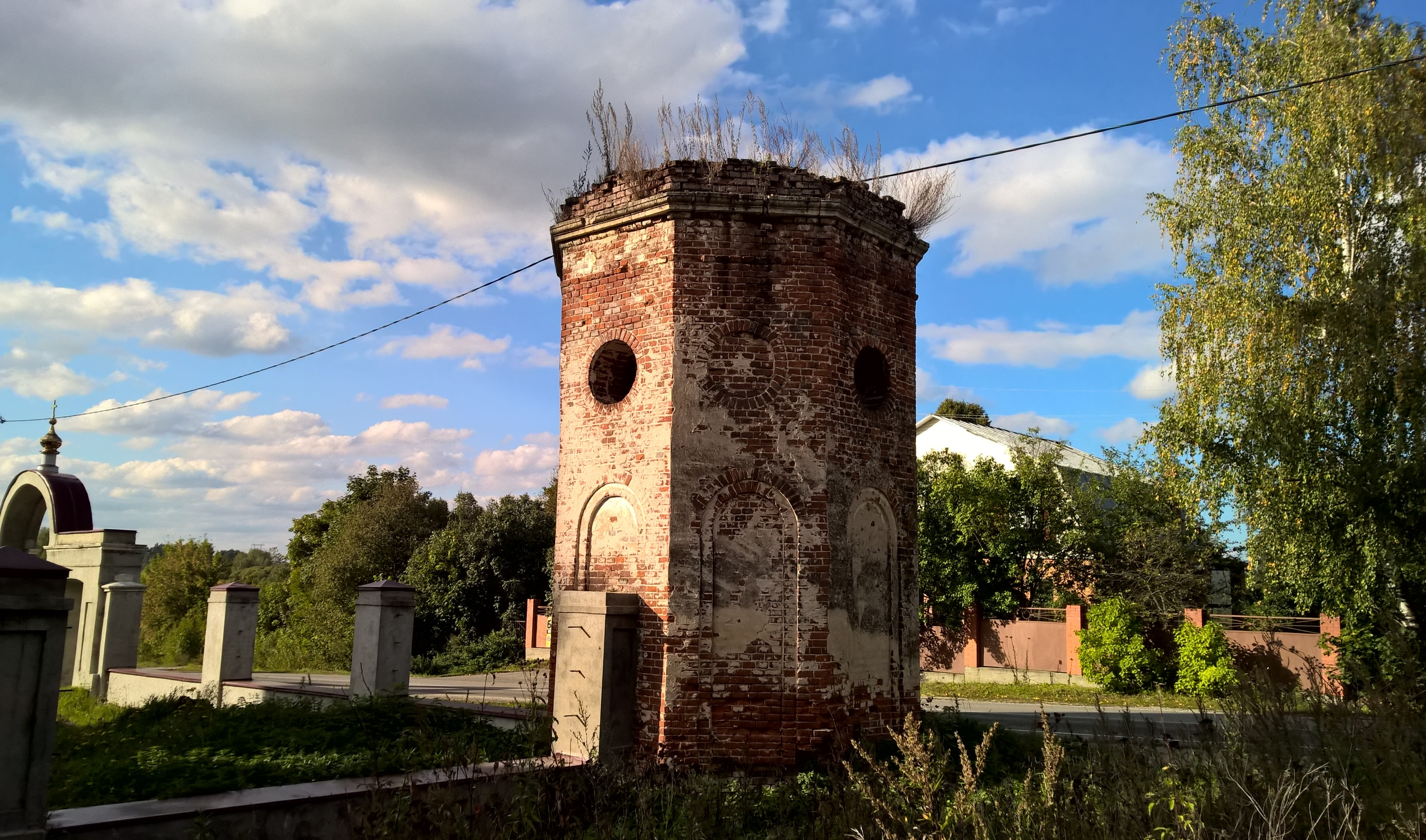 Угловые башни (башни ограды (четыре)): Троицкое (Троицкое-Лобаново), Ступинский район, Московская область